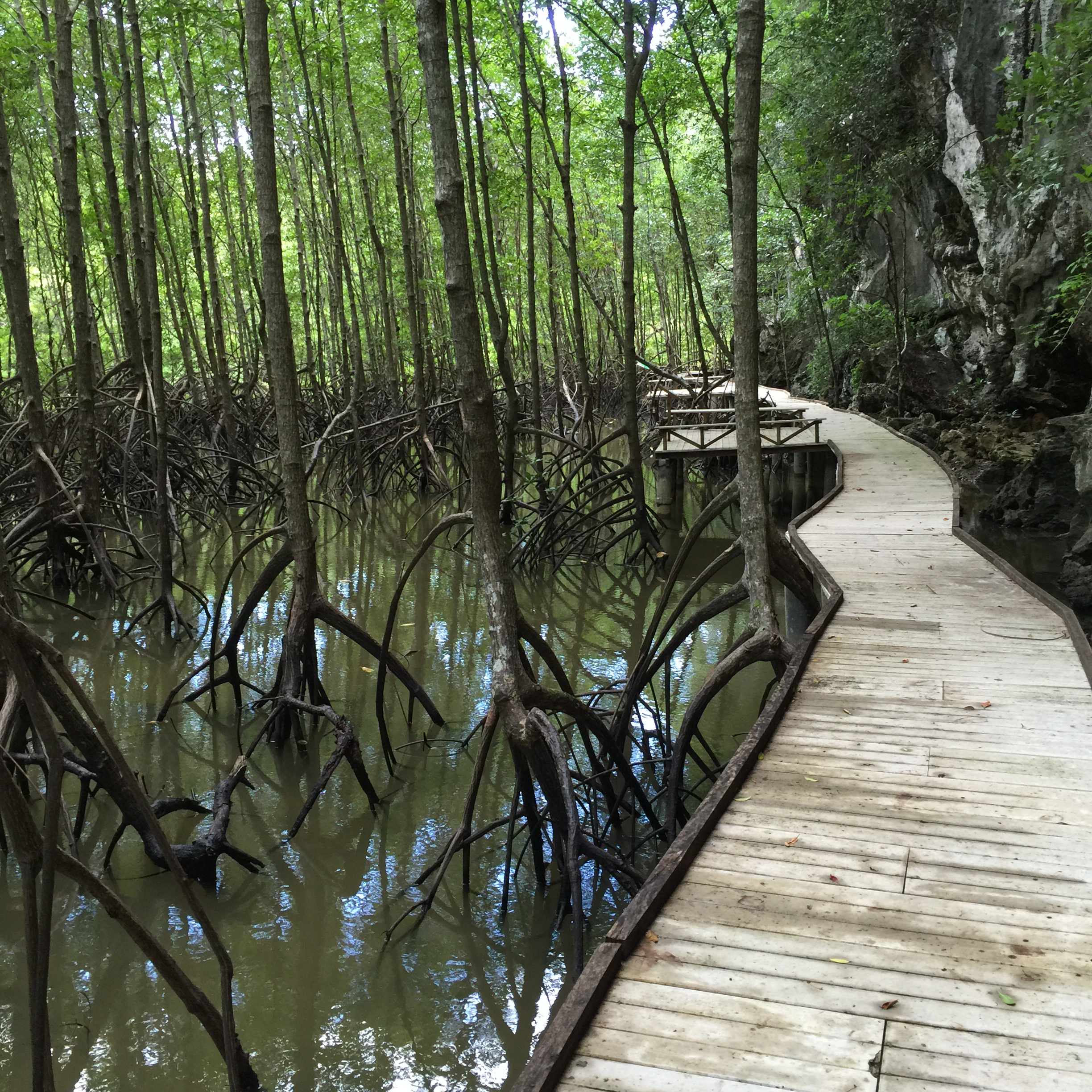 Ao Luek Tai, Ao Luek District, Krabi 81110, Thailand